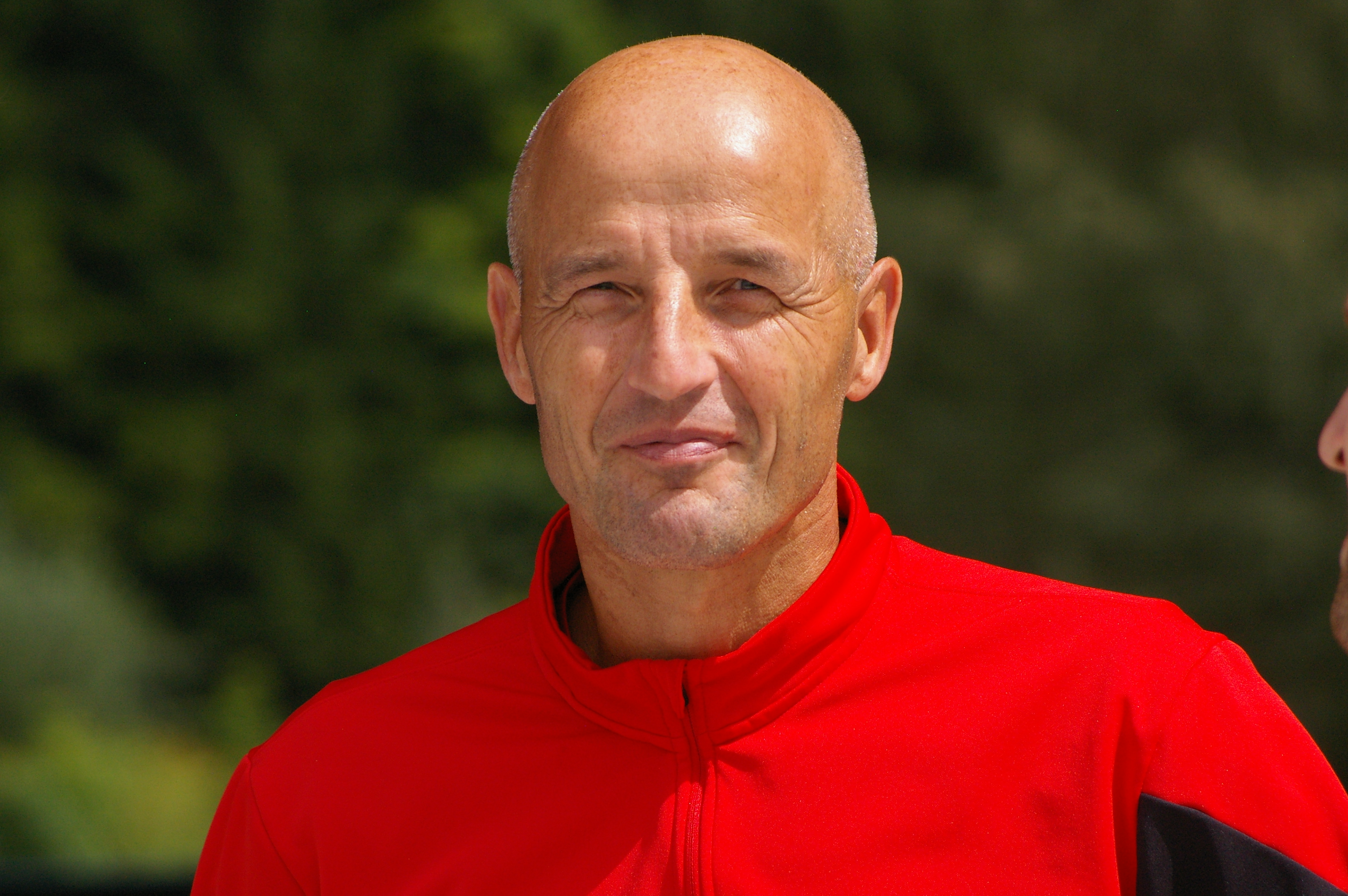 Nachwuchsturnier des FC RB Salzburg